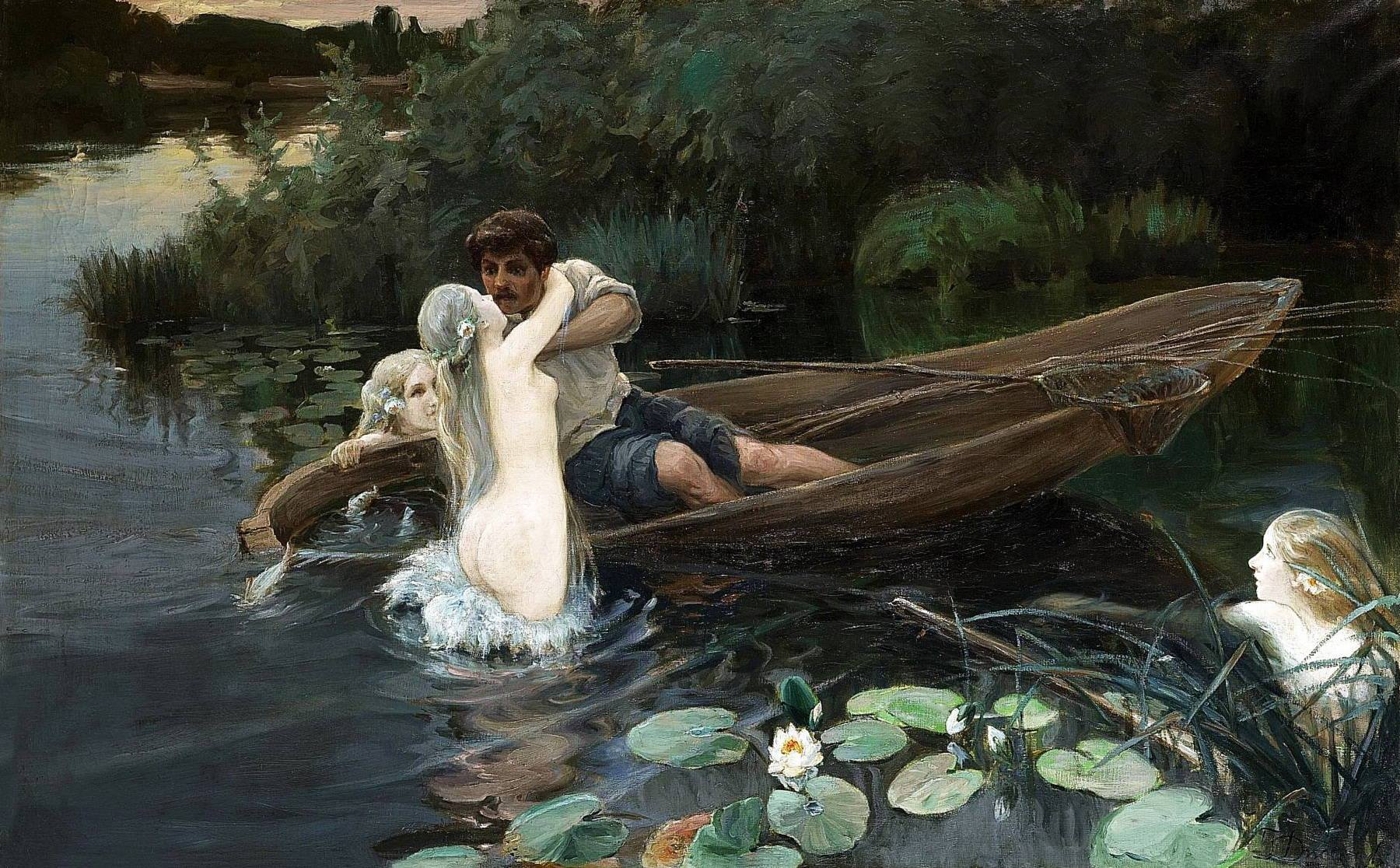 Водные глубины. Омут Холст, масло. 121 x 178 см